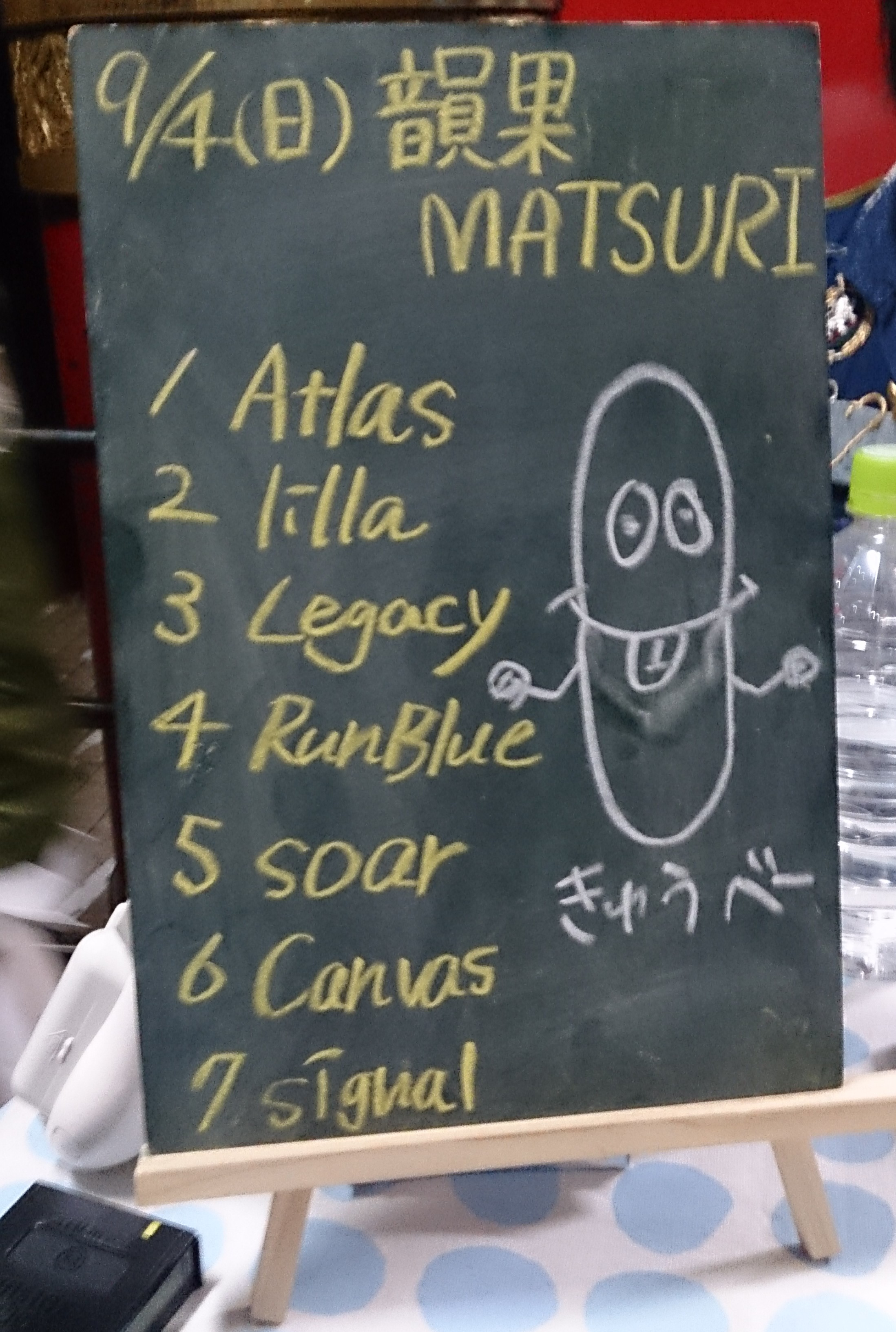 amiinAセトリボード(20160904(1))